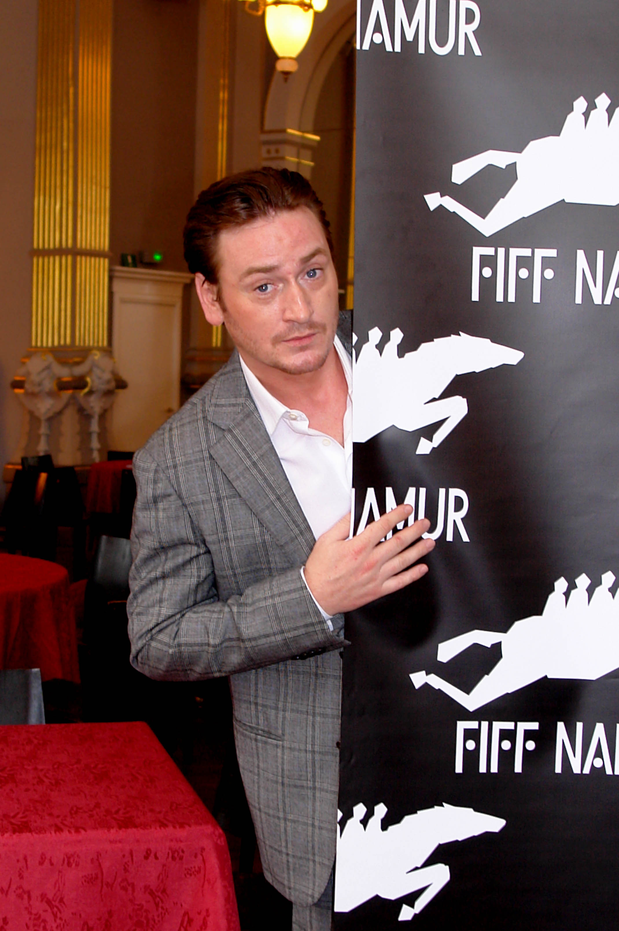 Benoit Magimel au Festival international du film francophone de Namur 2012